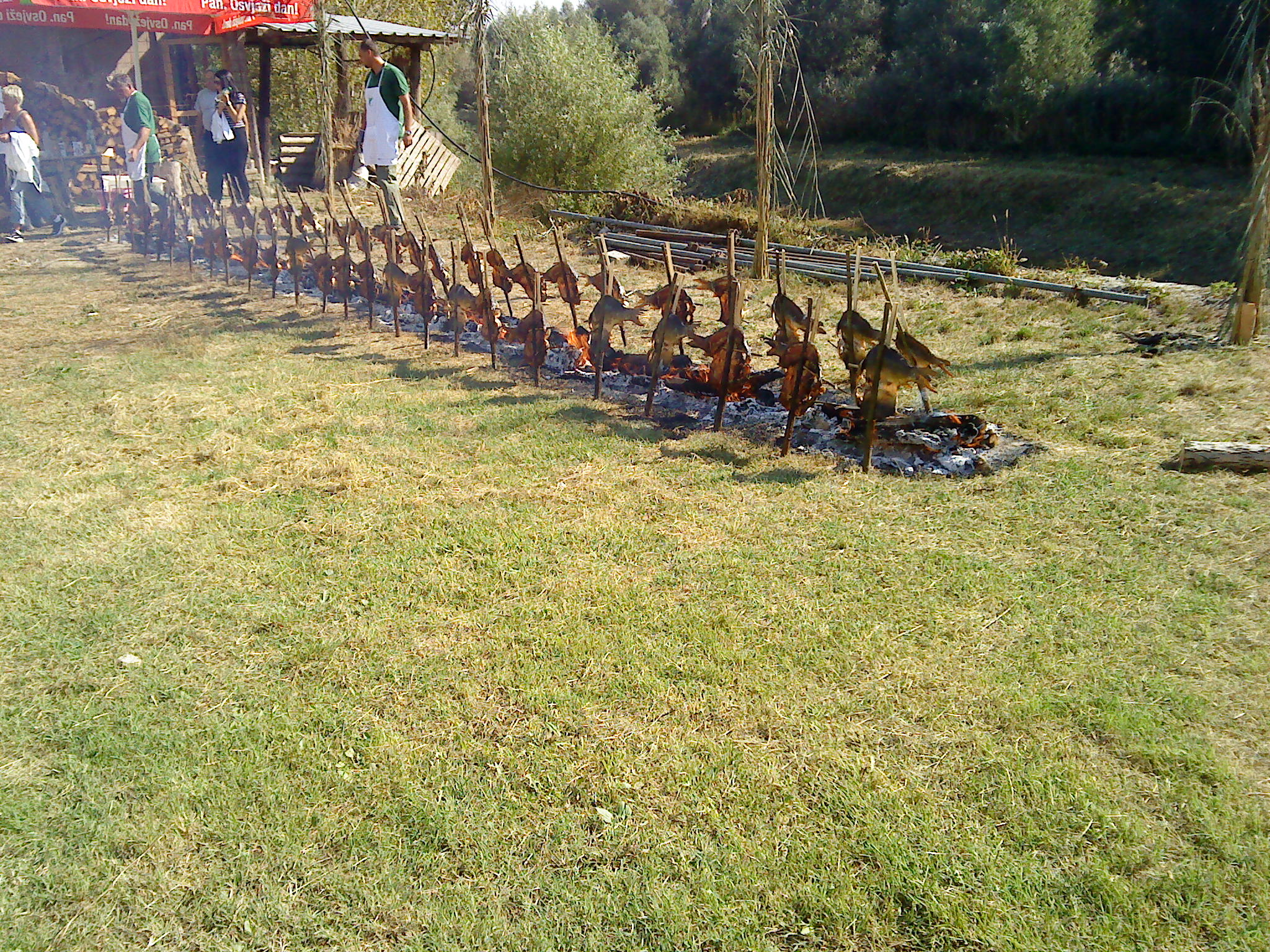 Csíptetős ponty Kopácson